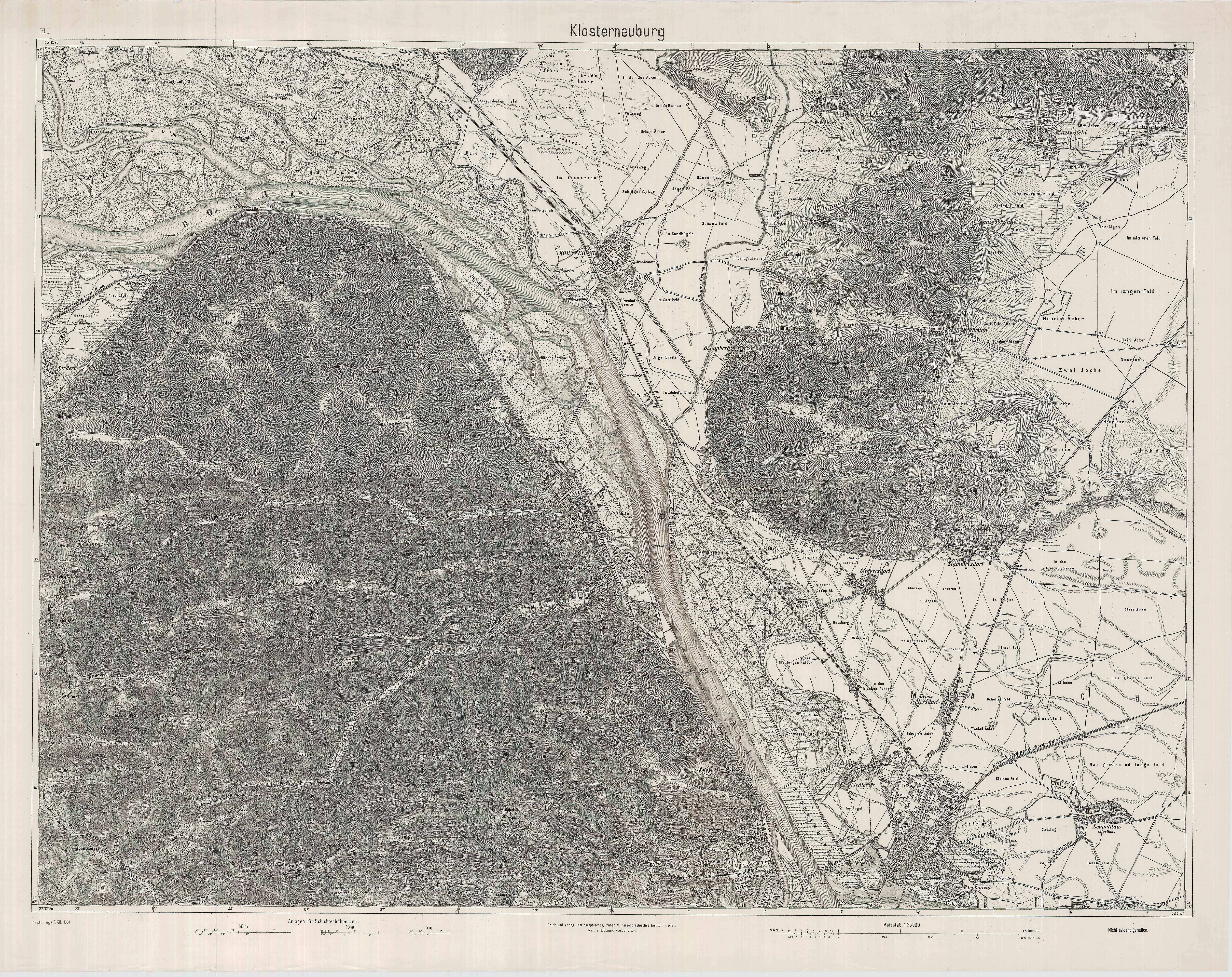 historische Landkarte 1:25.000. Donautal - Wiener Pforte - zwischen Wienerwald und Bisamberg, Klosterneuburg, Korneuburg, Floridsdorf, Nordwesten von Wien, kleine Fassung (300dpi, abgemagert)